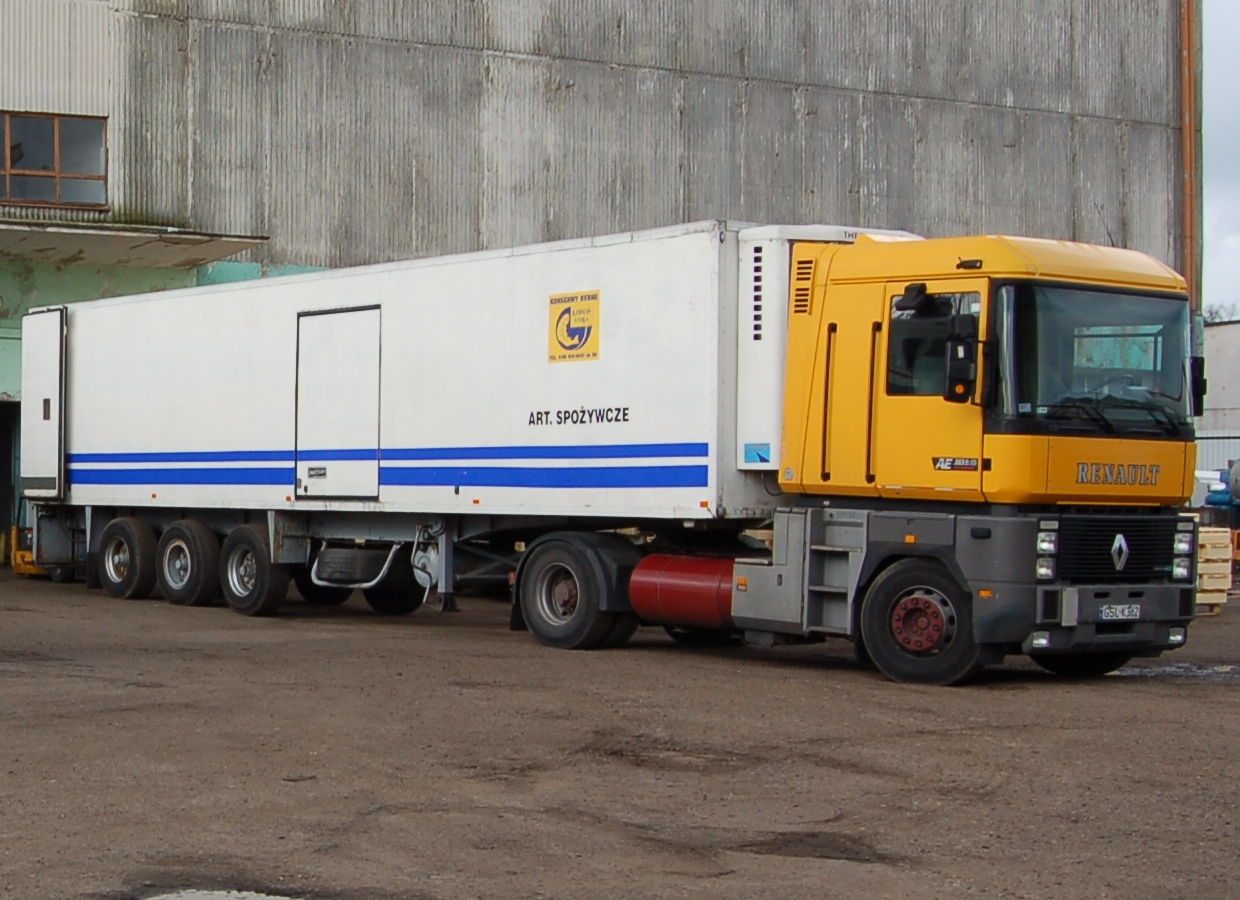 Ustka, harbour. Renault Magnum (AE).